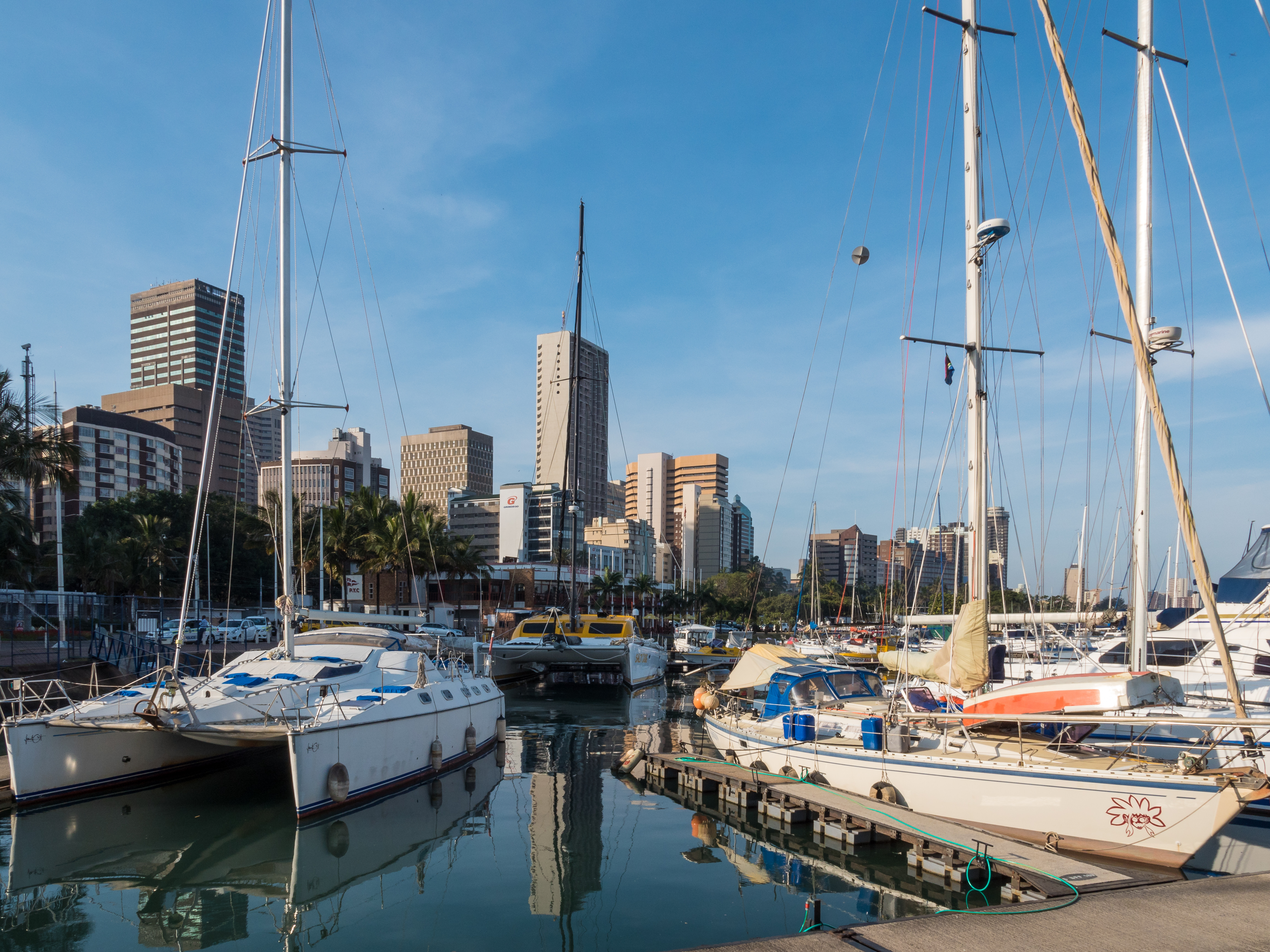 Vue du KwaZulu-Natal en Afrique du Sud.